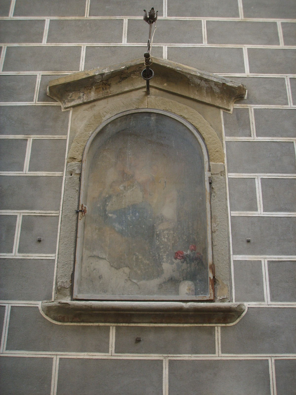 Tabernacolo palazzo bardi